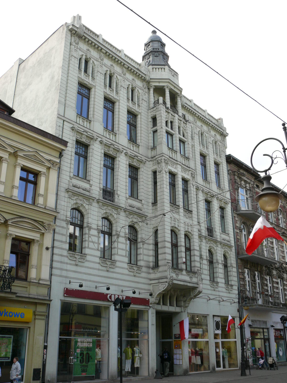 Kamienica Dawida Szmulewicza, Piotrkowska 37 w Łodzi